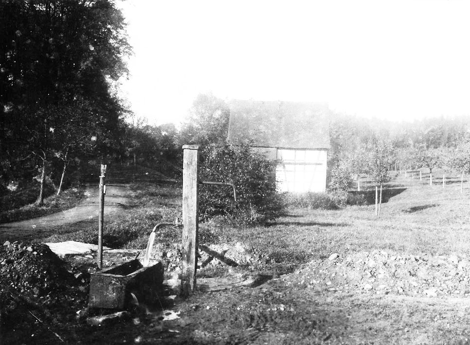 Der Brunnen - er fiel dem Straßenbau zum Opfer - und letzte Gebäude der Wildung Pferdsbach in Büdingen.